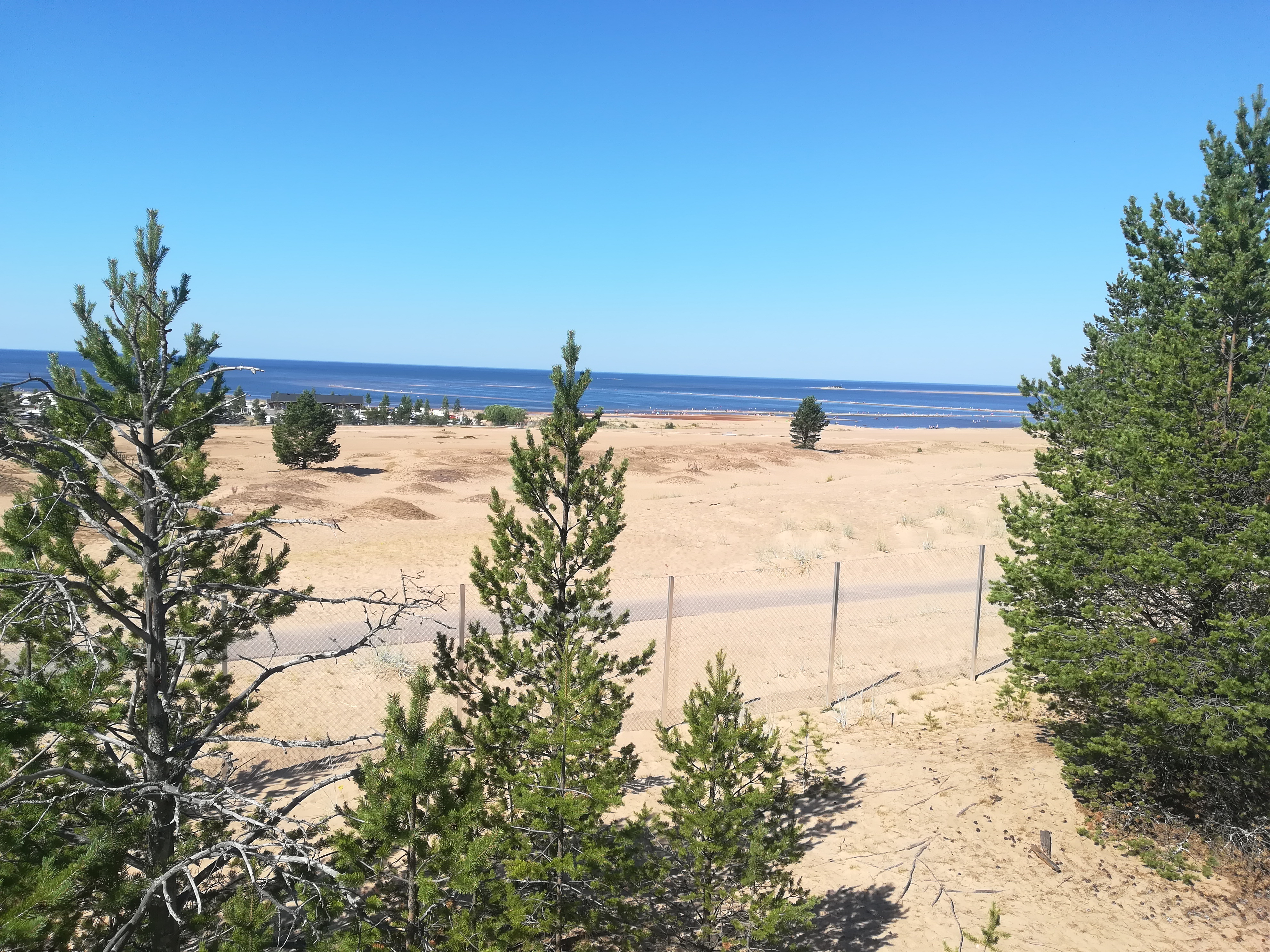 Kalajoen hiekkasärkät heinäkuussa 2018.